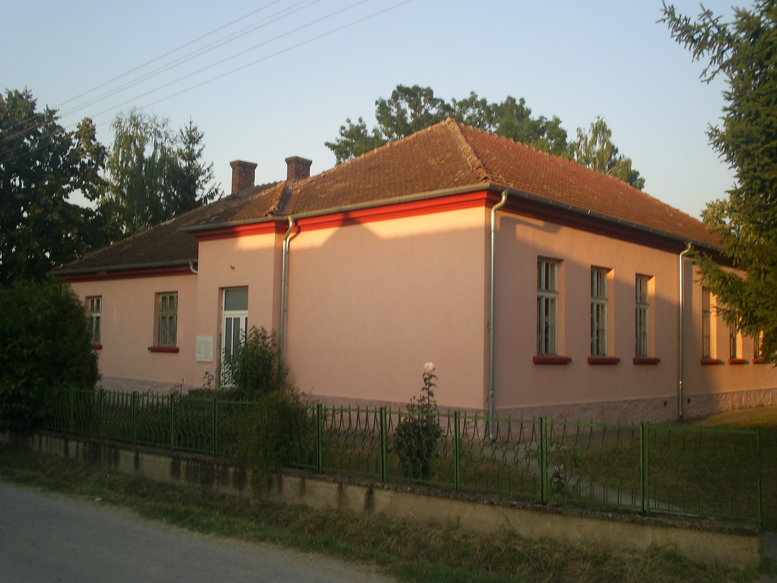 Основна школа „Свети Сава" Баточина издвојено одељење Кијево